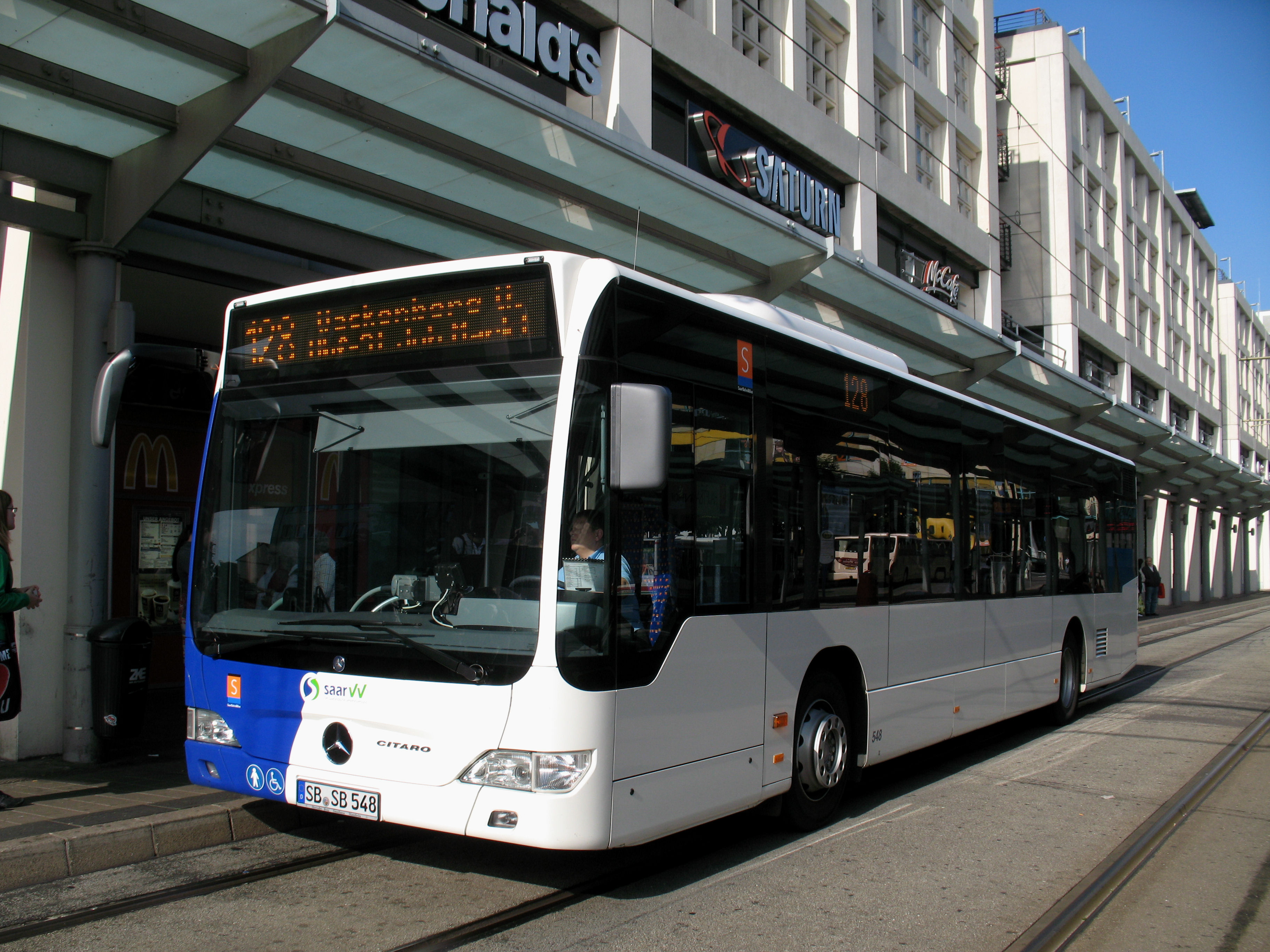 Ein Mercedes-Benz Citaro Saar VV Busse nahe dem Bahnhof in Saarbrücken.